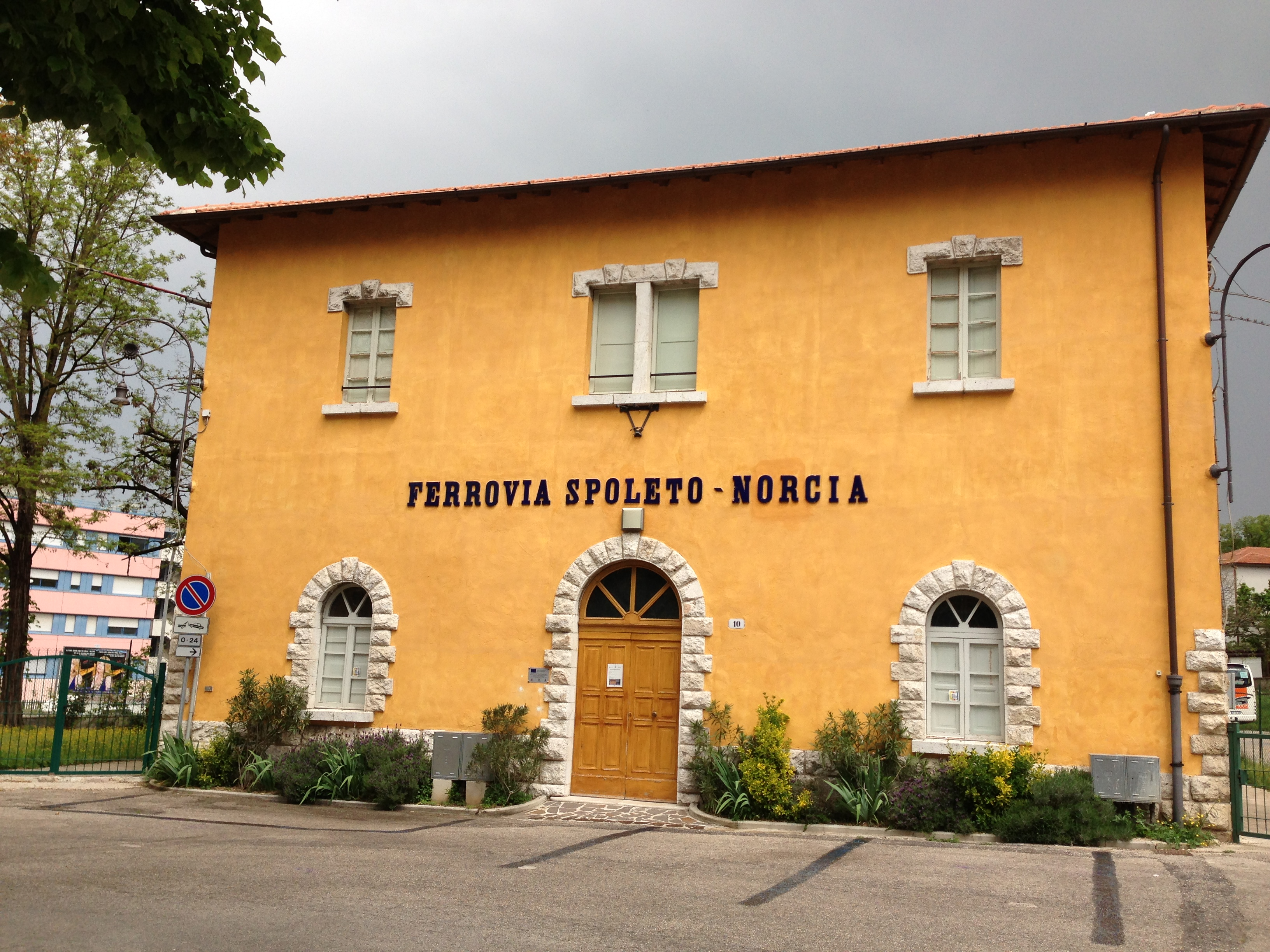 Ferrovia Spoleto - Norcia. Stazione di Spoleto. Facciata